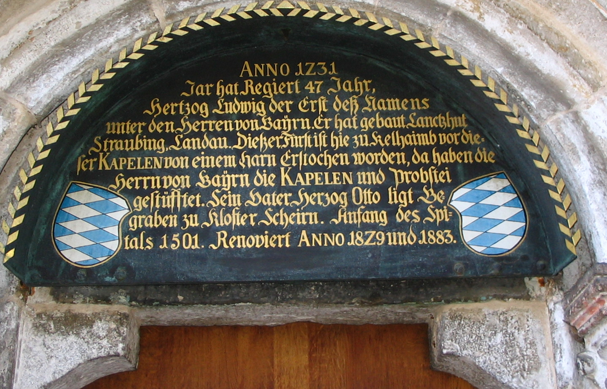 Tympanon der Ottokapelle, Stadt Kelheim, Niederbayern: Die Ottokapelle wurde von dem bayerischen Herzog Otto dem Erlauchten zum Andenken an seinen Vater Herzog Ludwig dem Kelheimer errichtet, welcher hier am 15.September 1231 einem vermutlich von Kaiser Friedrich II initiierten Messer-Attentat zum Opfer fiel